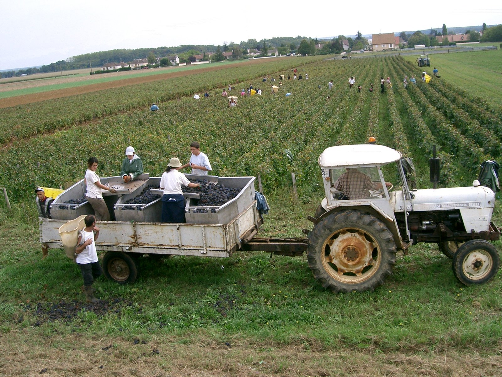 Vendanges en Bourgogne - côtes de Beaune. 2006-09-23 self made PRA